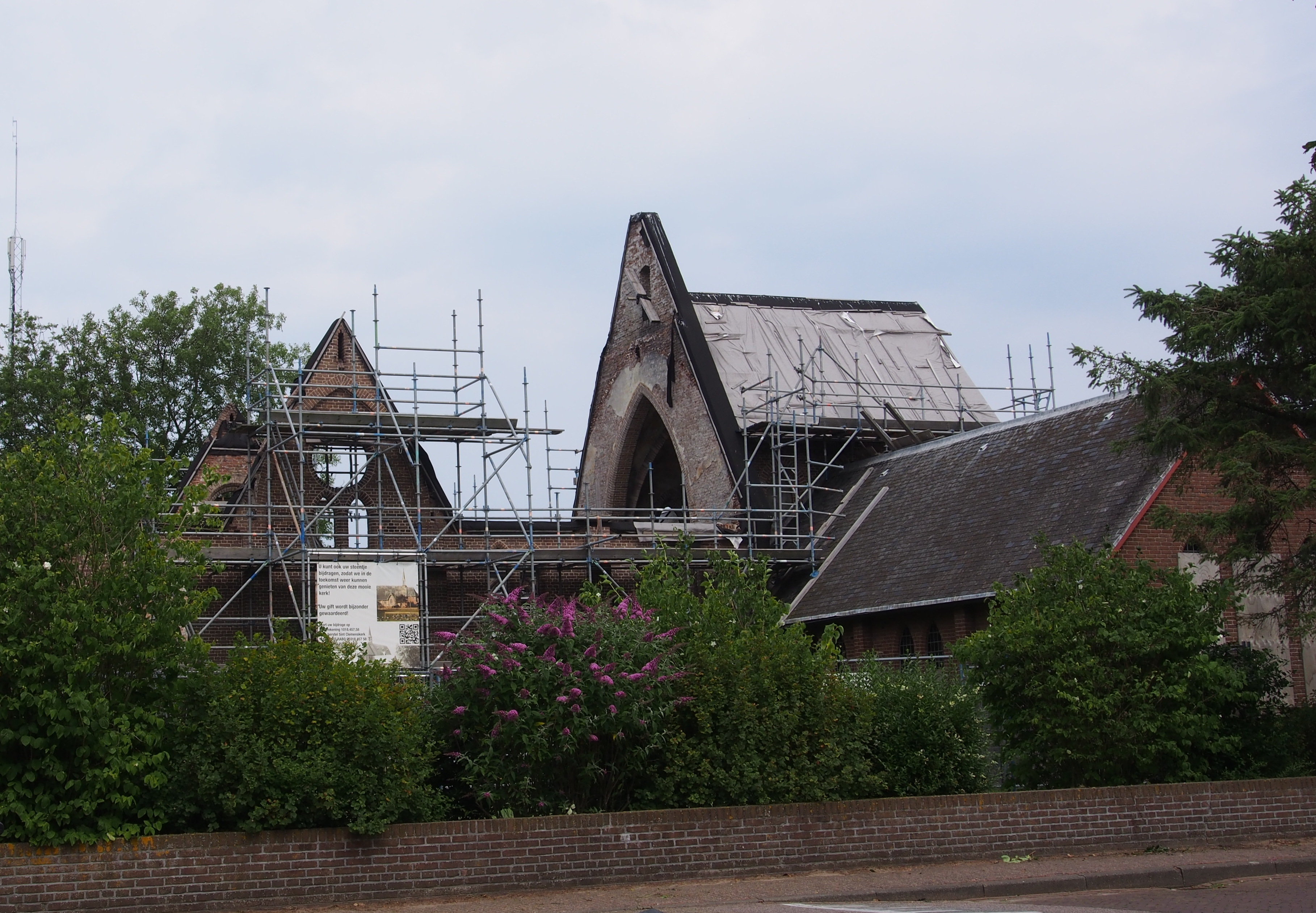 Herstel werkzaamheden aan de Sint-Clemenskerk